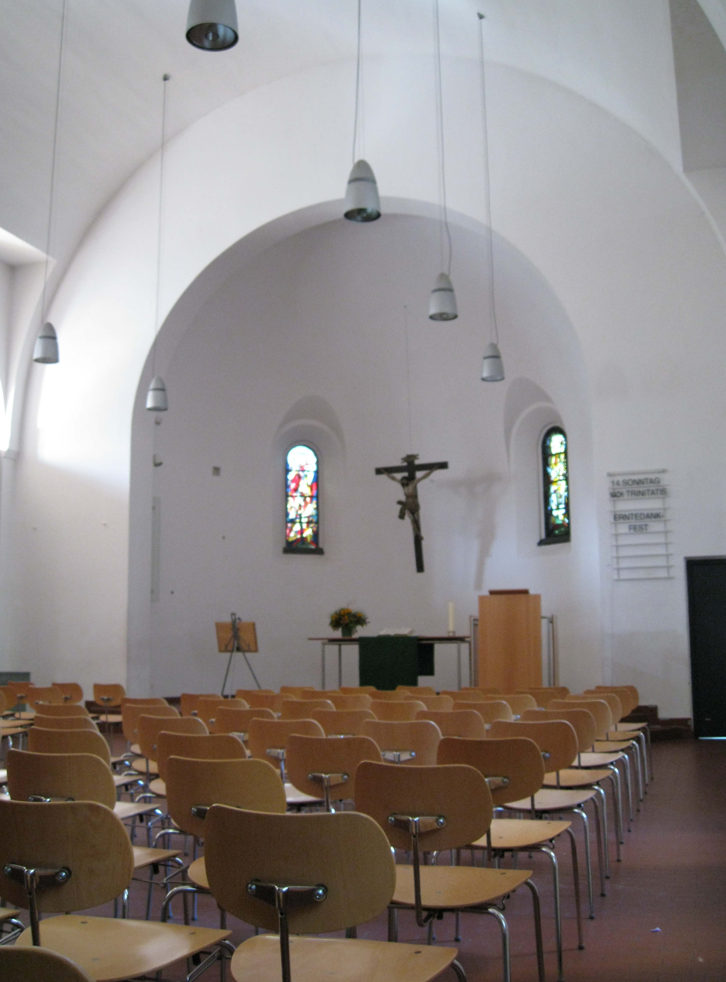 Blick in den Altarraum der Johanneskirche Schlachtensee